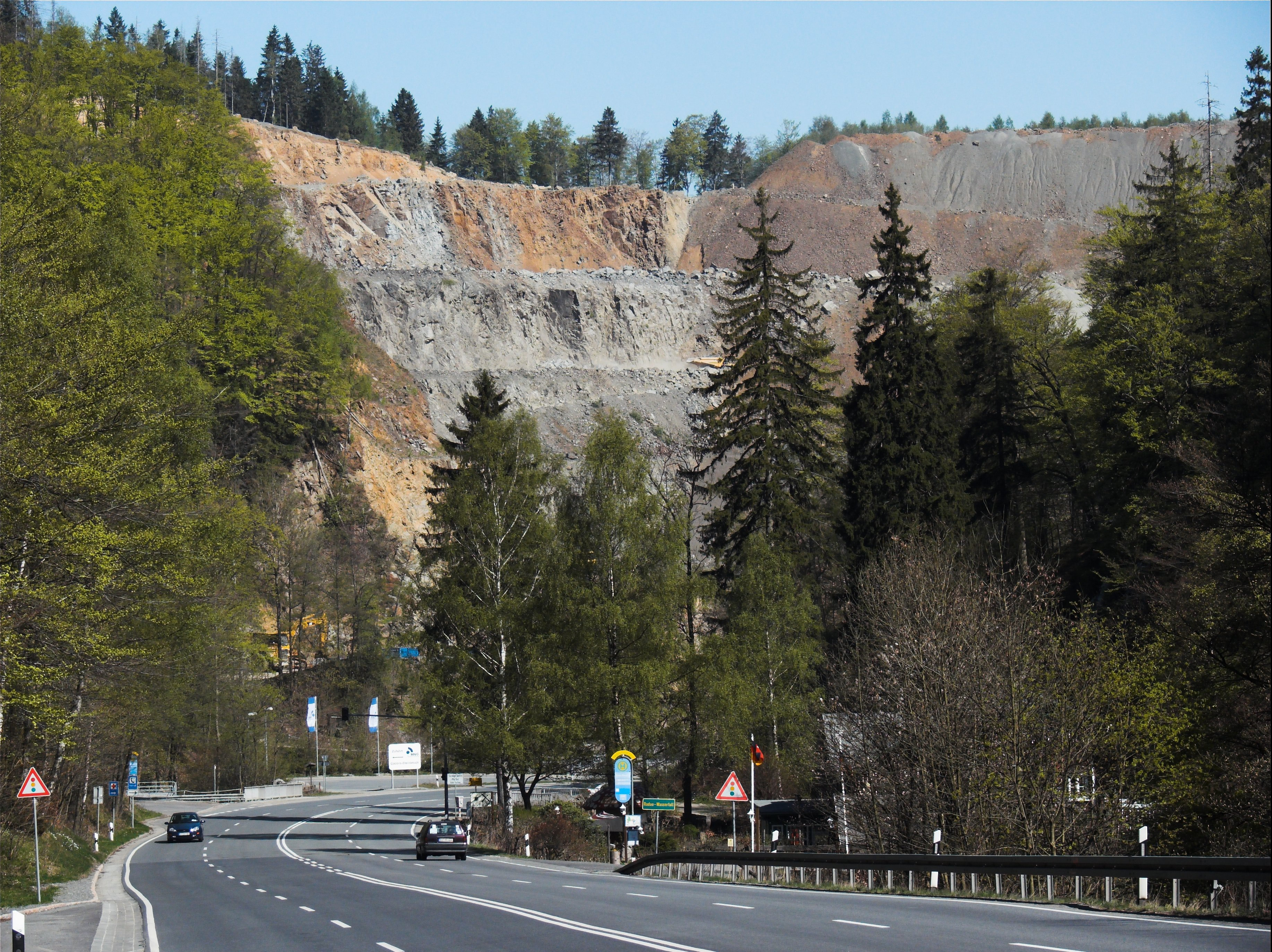 Der Gabbro-Steinbruch bei Bad Harzburg nahe dem Radau-Wasserfall